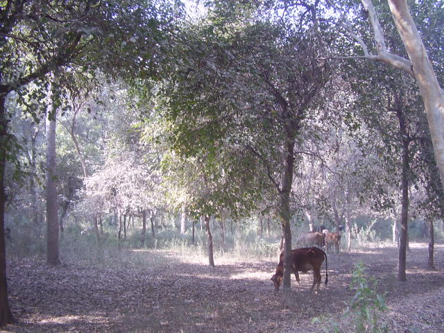 Jungle in Sahiwal,Punjab, Pakistan